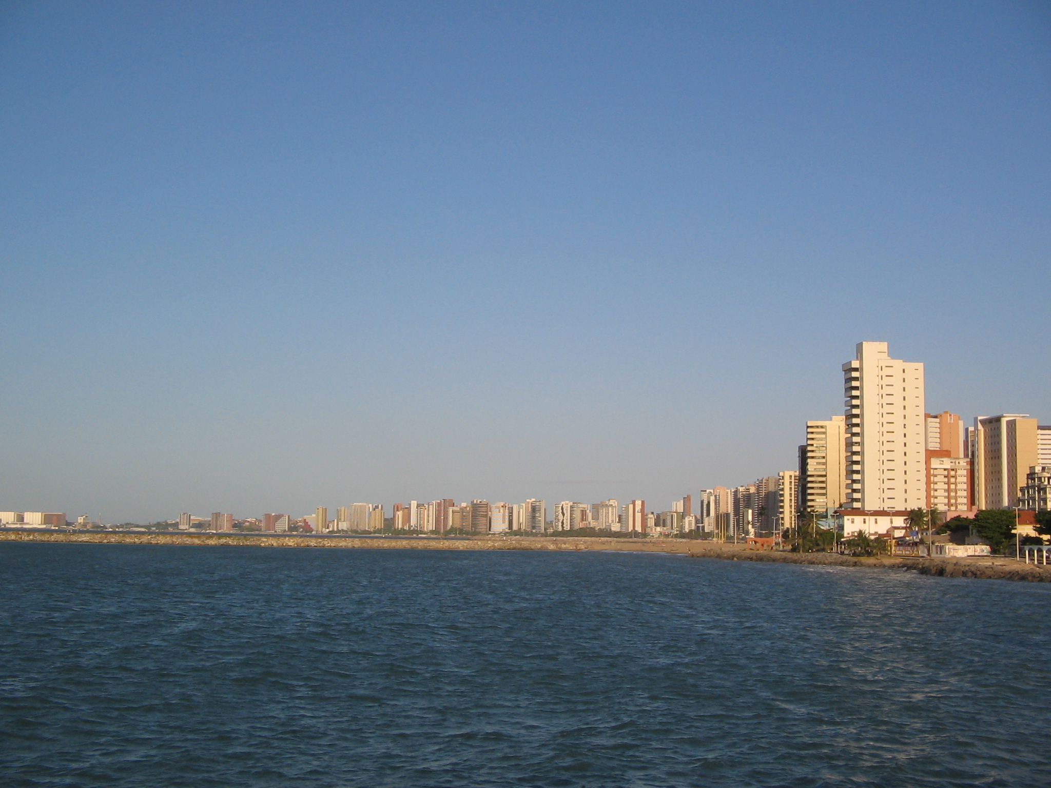 Orla de Fortaleza